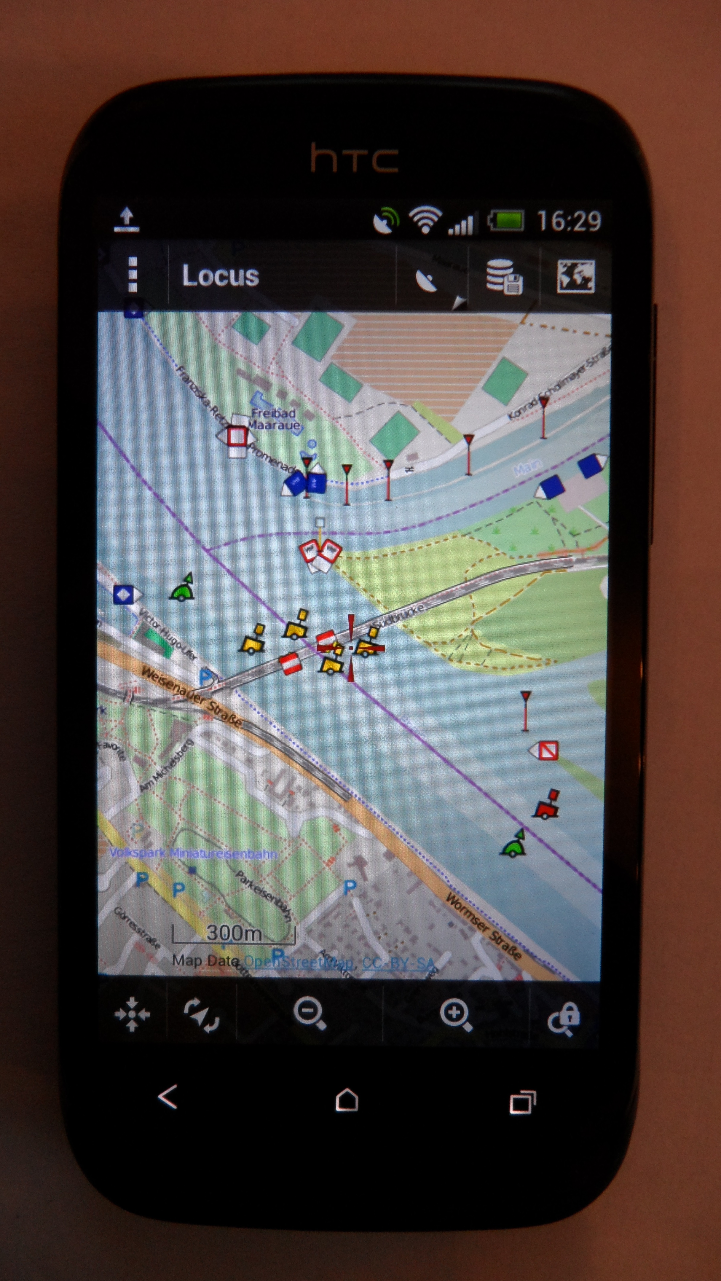 Zeigt die Karte von OpenSeaMap auf einem HTC-Android-Handy, dargestellt mit der App "Locus".